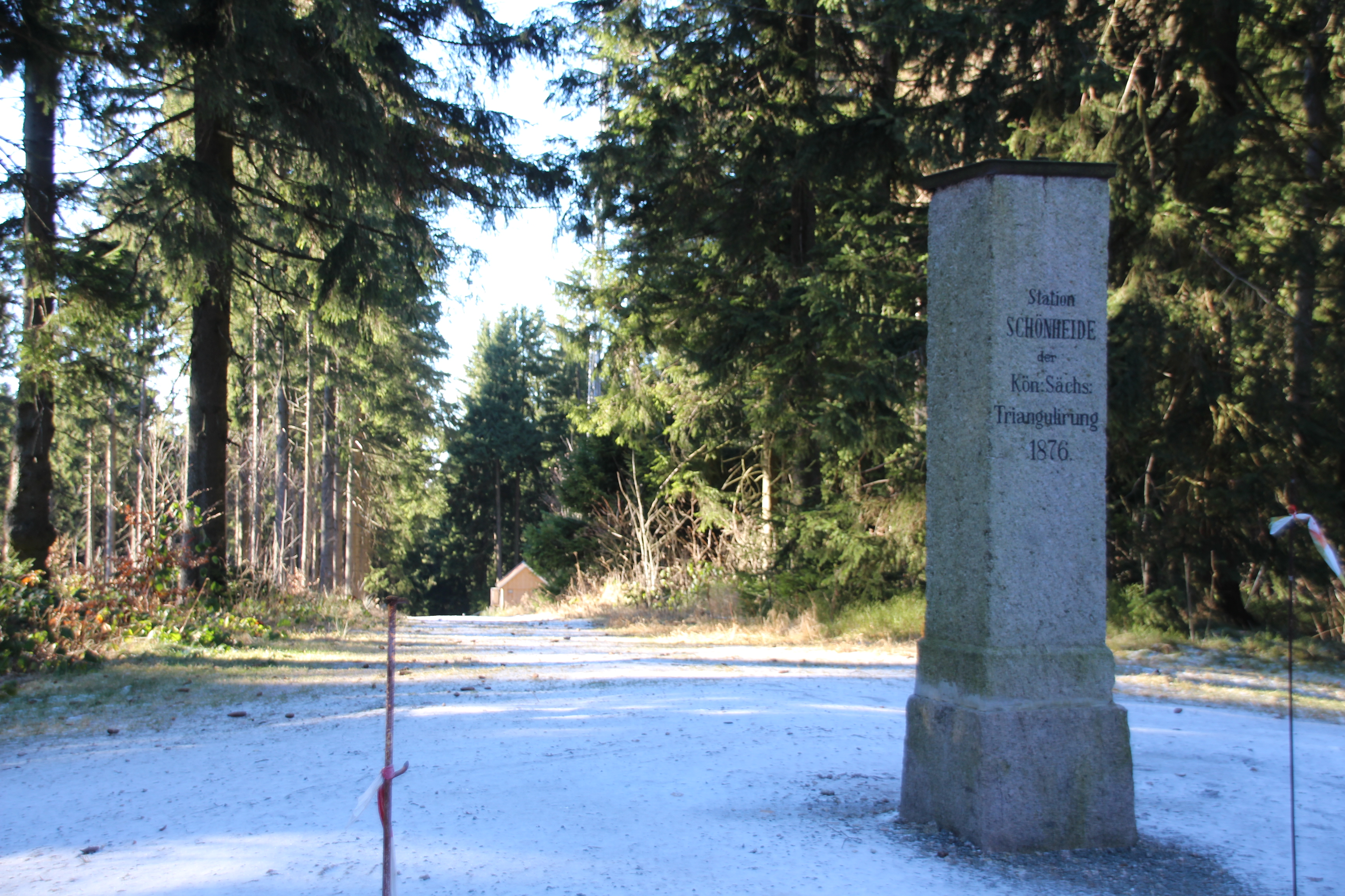 Im Jahr 2012 wurde auf dem Kuhberg (Stützengrün) westlich des Aussichtsturms ein Mobilfunk-Sendeturm in Form eines Stahlgittermastes aufgestellt. Er überragt die Bäume auf dem Berggipfel deutlich und ist aus der Umgebung - anders als der Aussichtsturm - deutlich zu sehen. (Freie Presse, Regionalausgabe Auerbach, vom 15. Oktober 2012 Webseite der Zeitung Freie Presse, abgerufen am 7. April 2017) Sendemast und kleiner Technikbau stehen im Bild hinten in der Mitte. Im Vordergrund steht die Triangulationssaeule Station 140 Schönheide im Erzgebirge als Vermessungspunkt II.Ordnung der Königlich-Sächsischen Triangulirung. Die Säule trägt das Datum 1876.